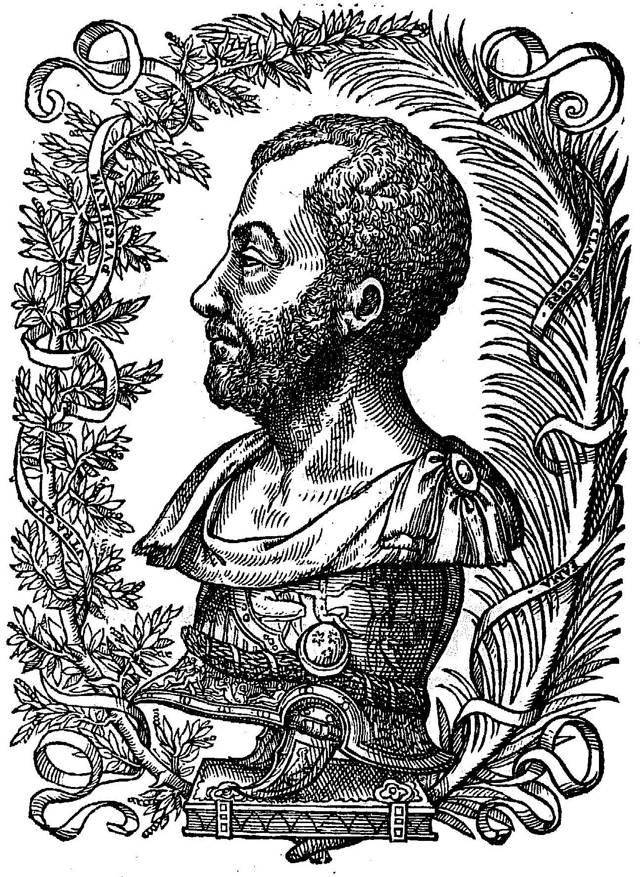 Portrait de Gabriel Simeoni dans son livre Illustratione de gli epitaffi